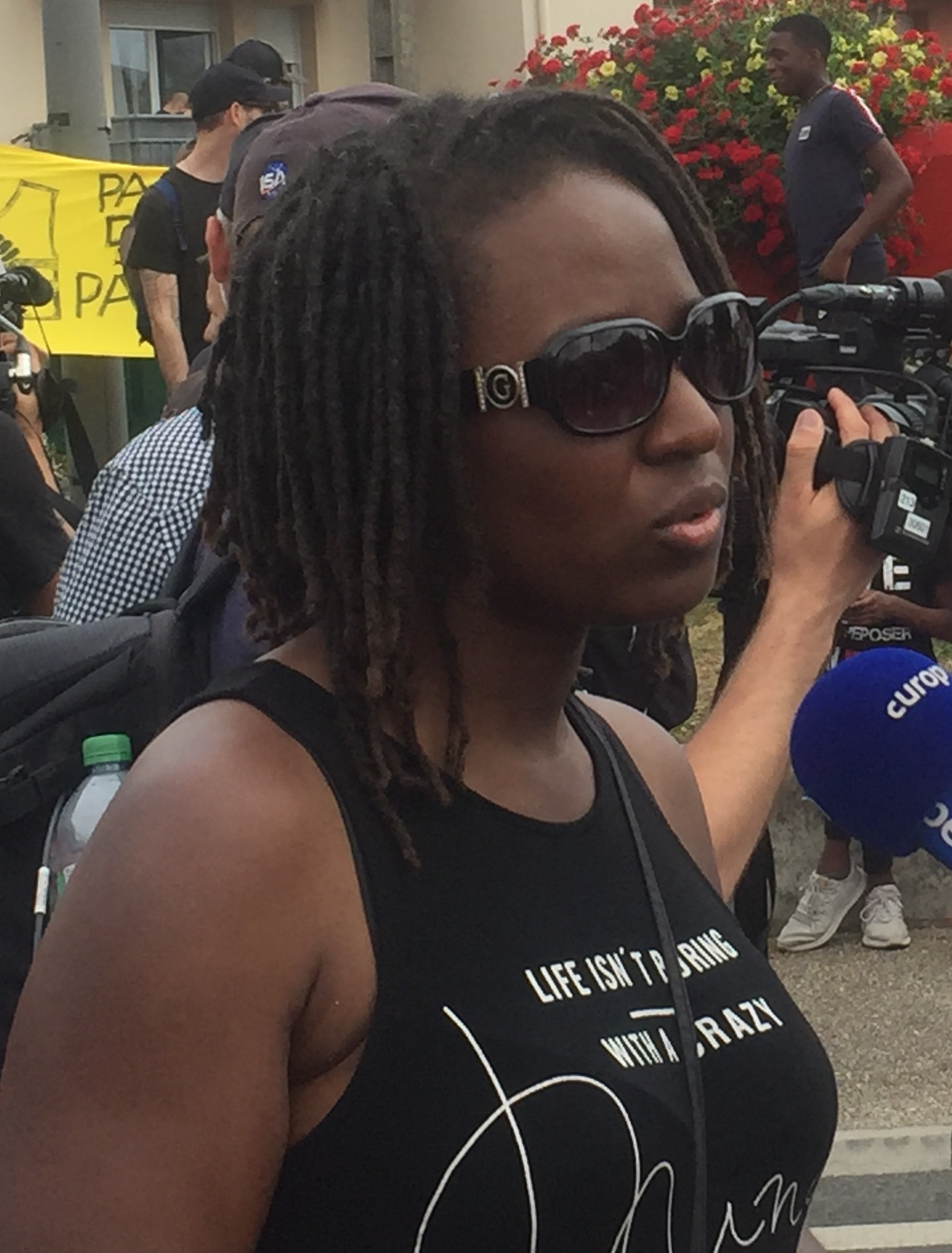 Priscillia Ludosky, figure du mouvement des Gilets jaunes, à la Marche pour Adama le 19 juillet 2019 devant la gare de Persan-Beaumont.